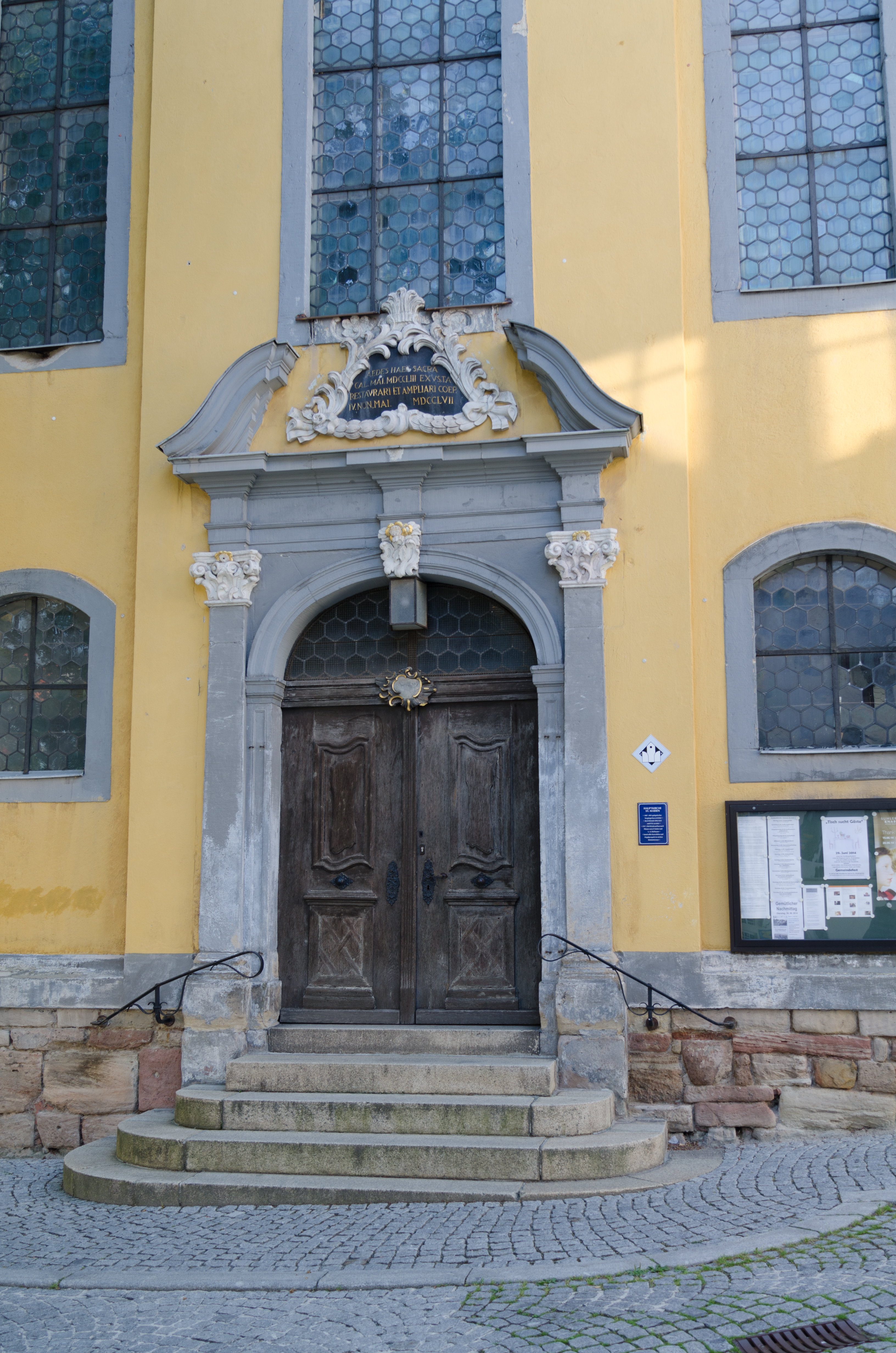 Suhl, Marienkirche